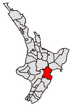 Die Karte zeigt die Lage des Hastings District Council auf der Nordinsel Neuseelands rot selbst erstellt